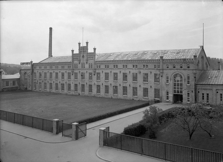 Kampenhof spinning mill, Uddevalla, Sweden (1858-1954)